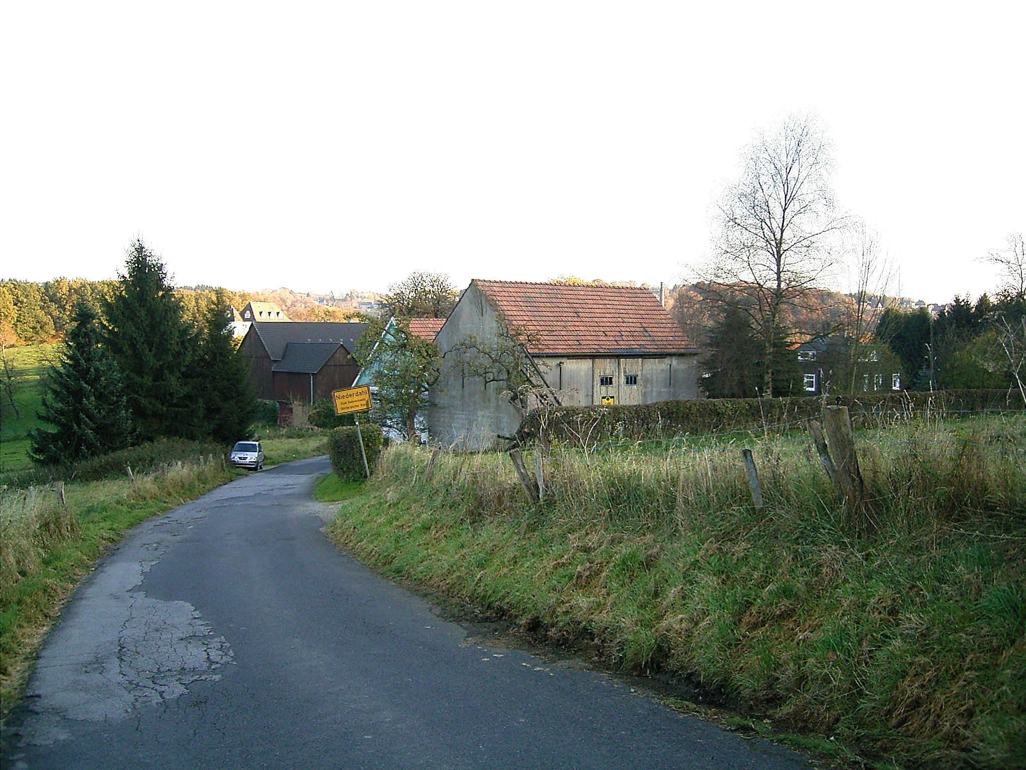 Radevormwald